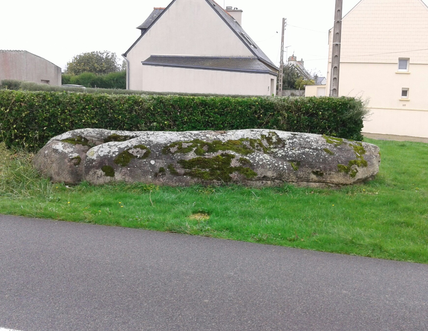 Menhir de Kervédal, Penmarc'h